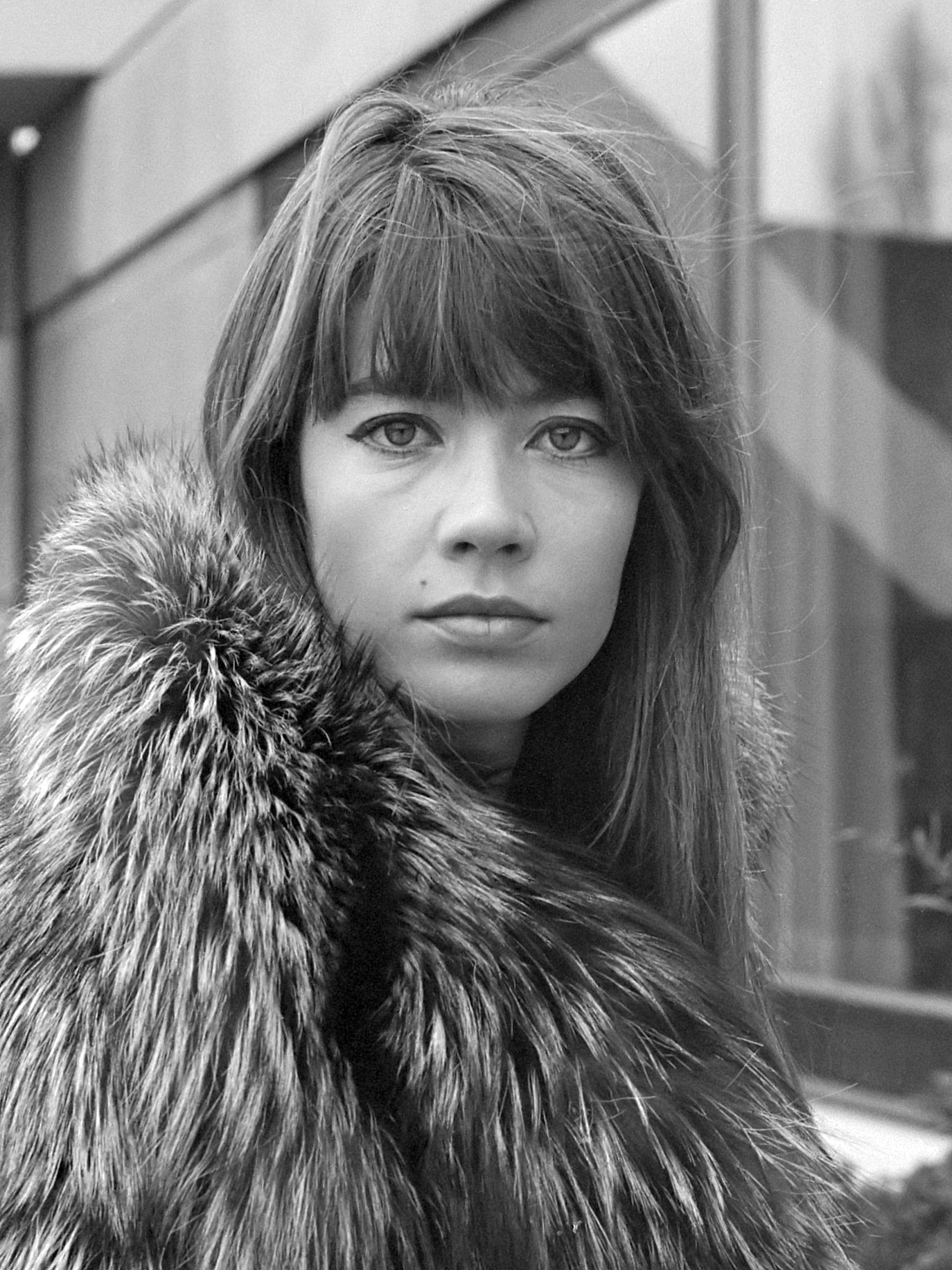 Franse zangeres-actrice Francoise Hardy in Amsterdam 16 december 1969